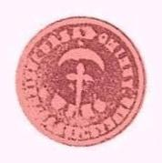 pieczęć wsi Jasienica Sufczyńska 1876-1918